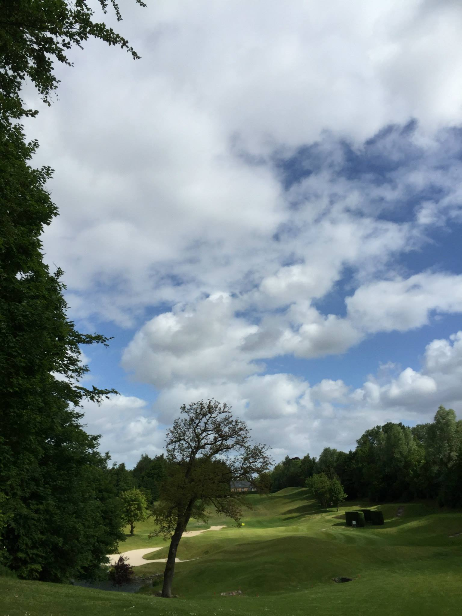 Golf de Sept Fontaines by GdML